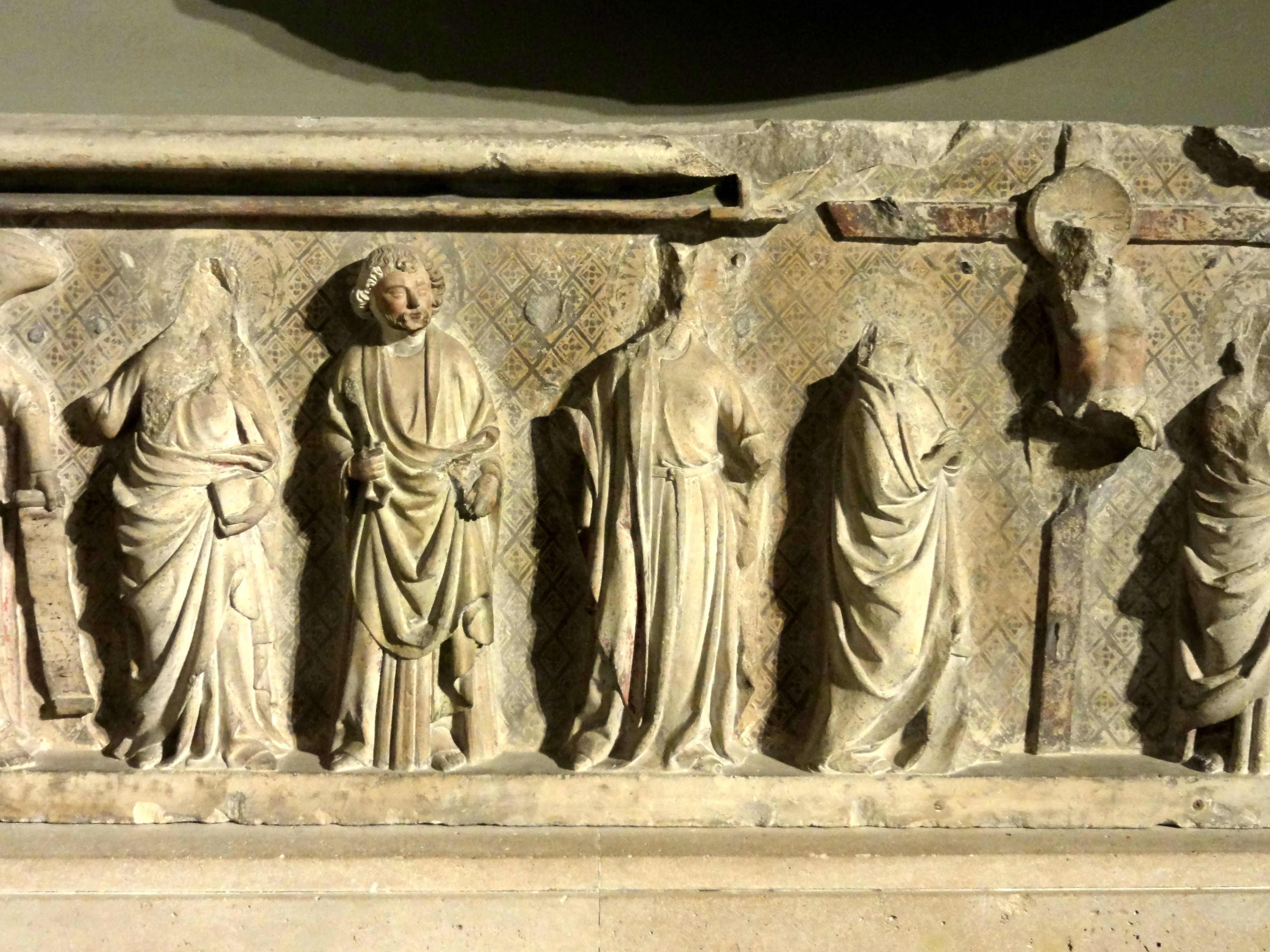 Sainte-Chapelle de l'abbaye Saint-Germer-de-Fly , retable (1259-1267), envoyé au musée de Cluny par É. Bœswilwald en 1846 : Visitation, Annonciation, Crucifixion, scènes de la vie de saint Ouen et de saint Édouard ou de saint Germer. Cl. 18749.